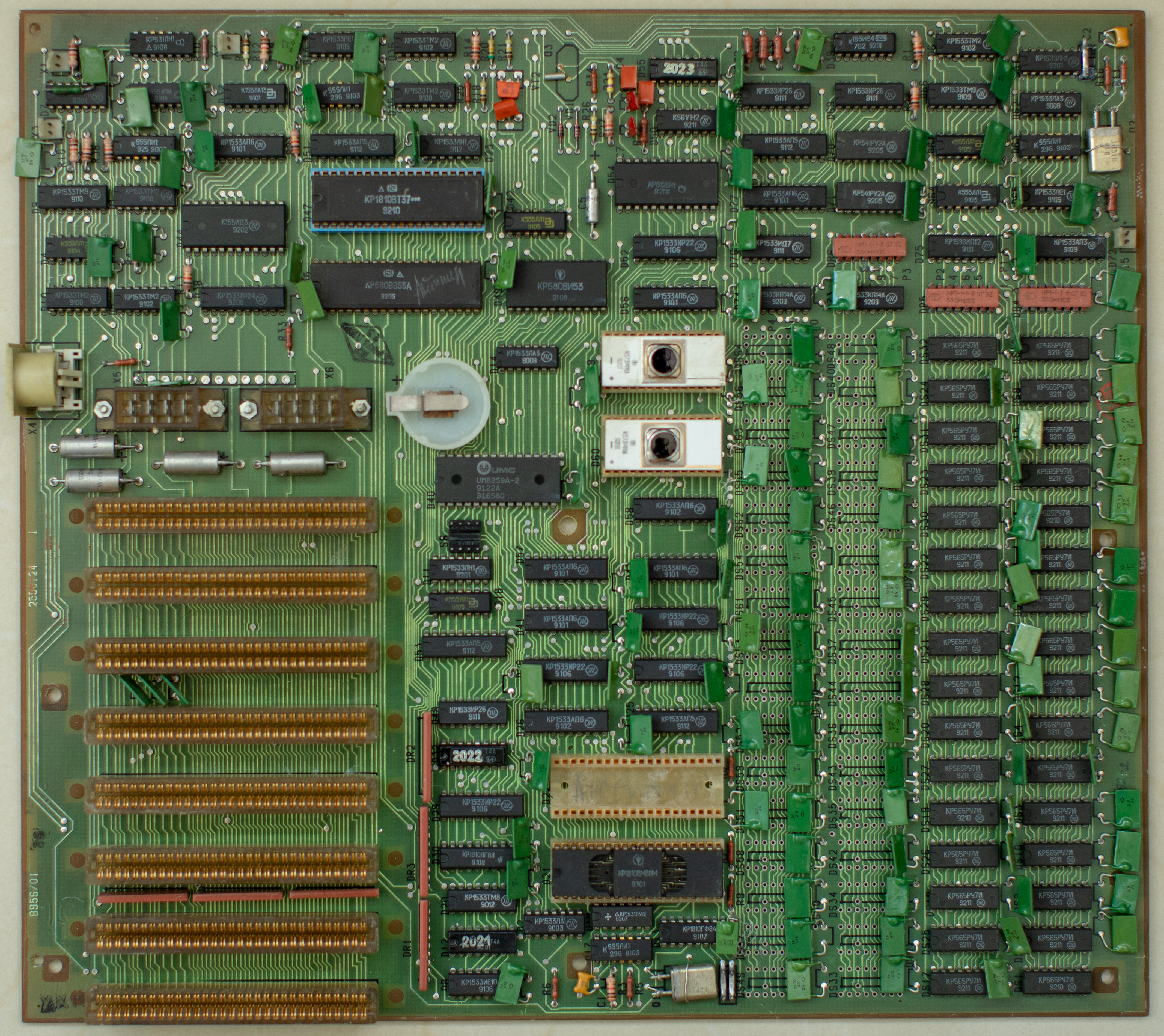 Материнская плата ПК "Поиск-2" производства НПО "Электронмаш", Украина, СССР